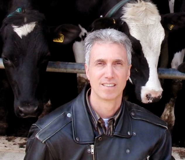 דורון עוזרי